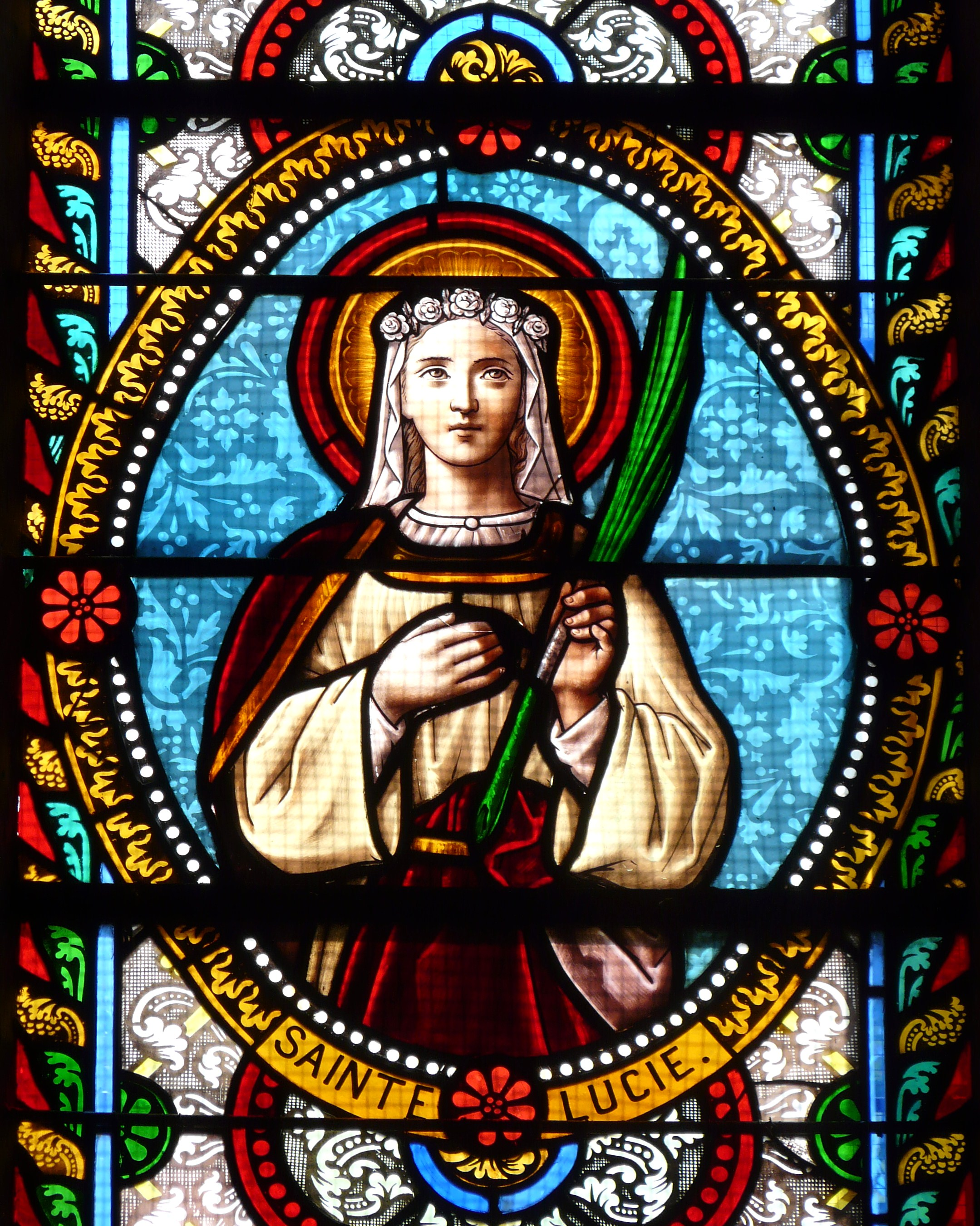 Sainte Lucie, détail d'un vitrail de la nef de l'église Saint-Joseph, La Coquille, Dordogne, France.